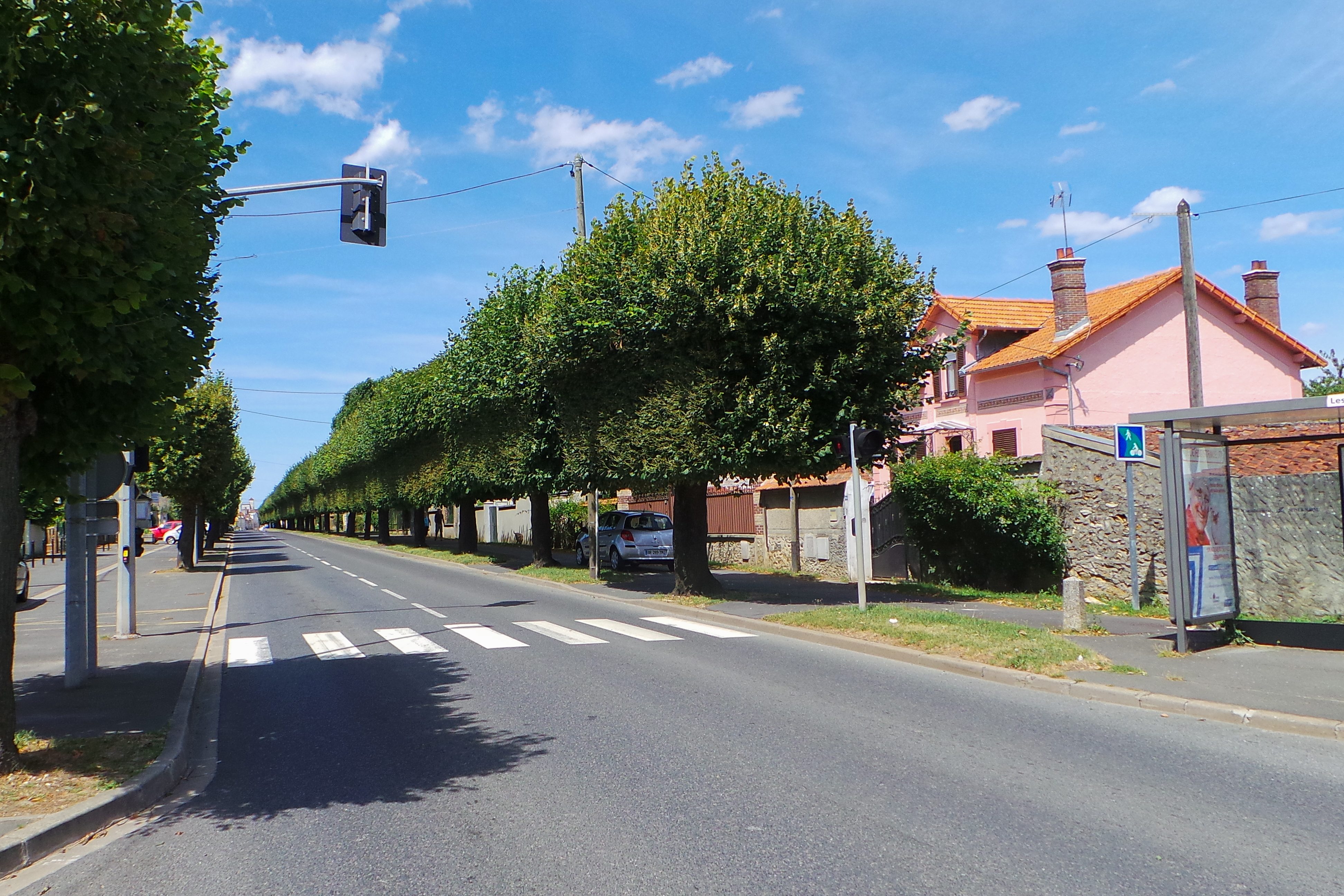 Rue de Troyes / Guignes, Seine-et-Marne, France